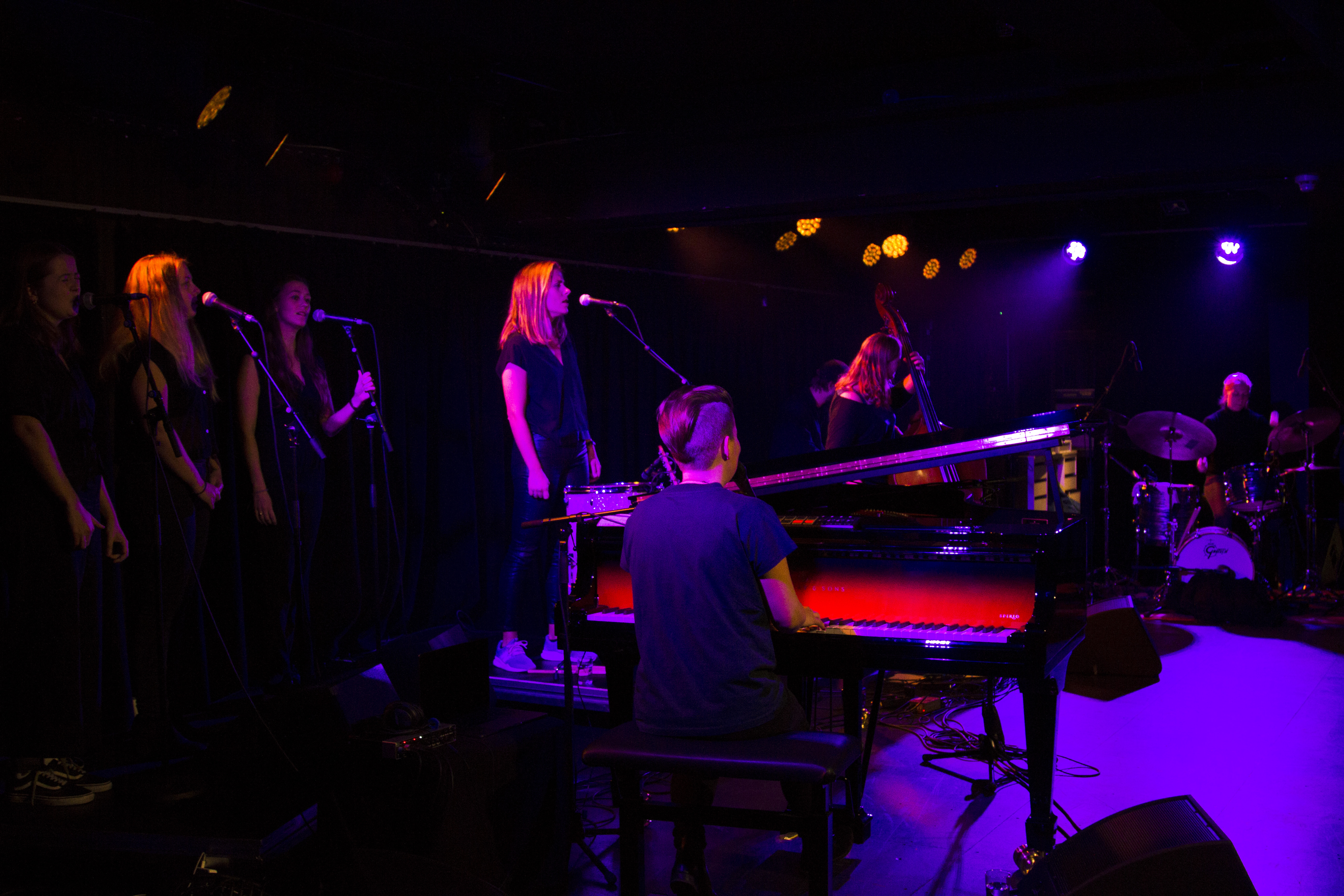 Livebilde fra releasekonsert Falkevik